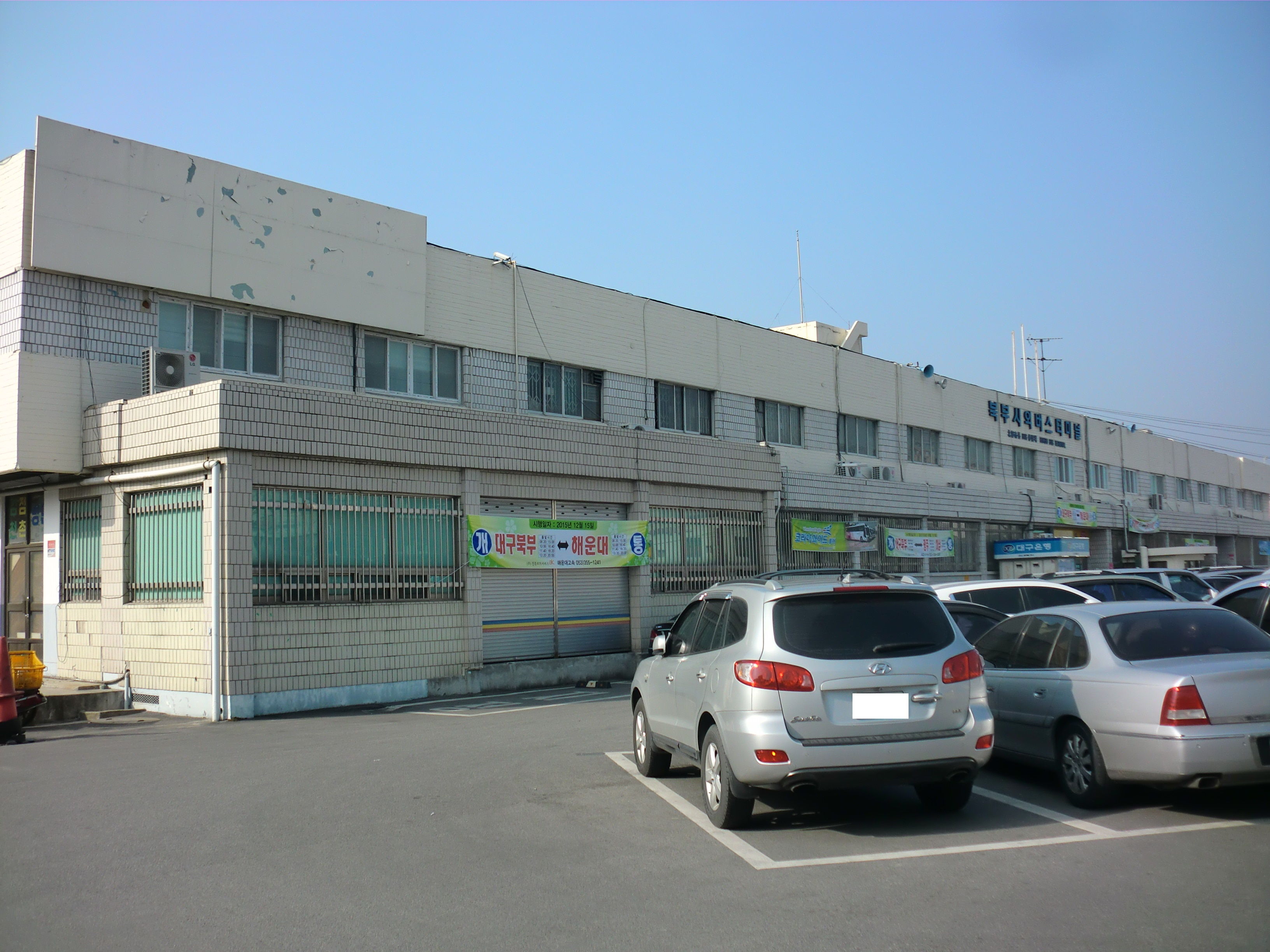 대구광역시 서구에 있는 북부시외버스터미널